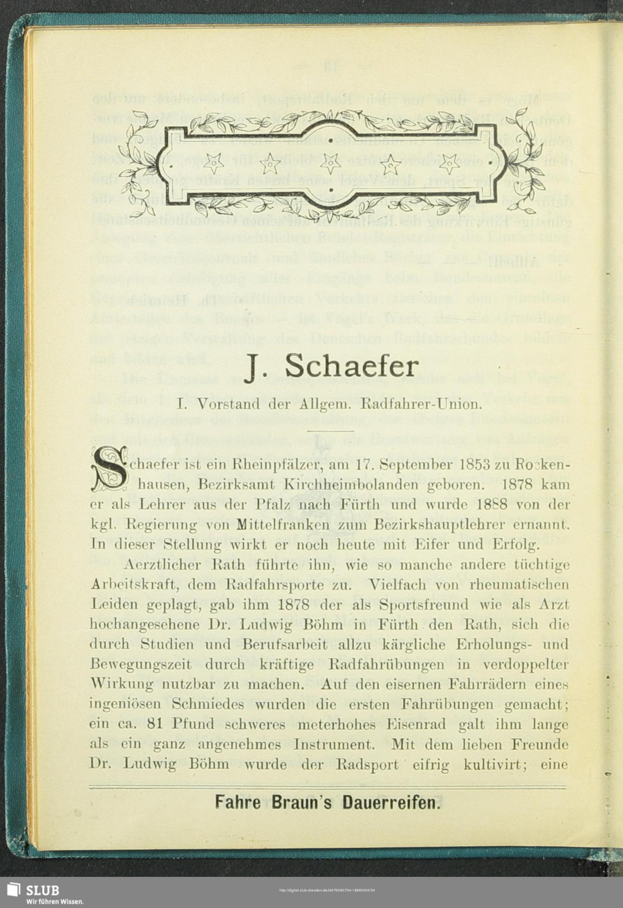 Jahrbuch der deutschen Radfahrer-Vereine, 1897, image 034